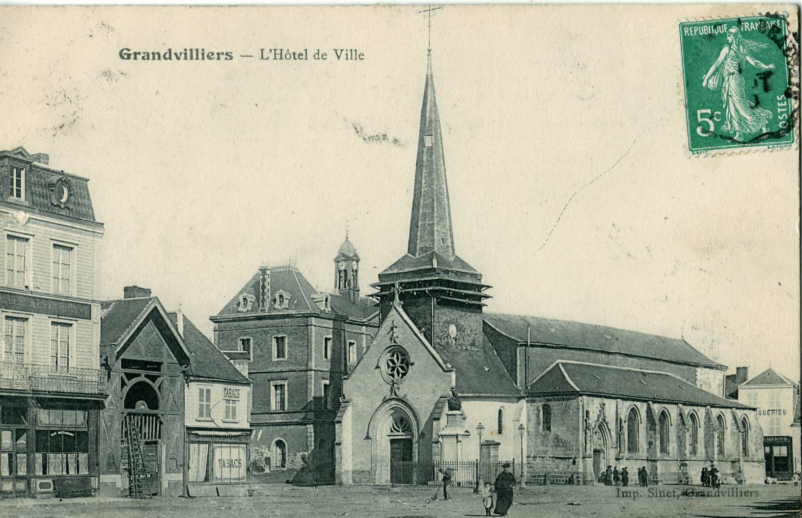 Carte postale ancienne éditée par Sinet GRANDVILLIERS (Oise) : l'Hôtel de Ville